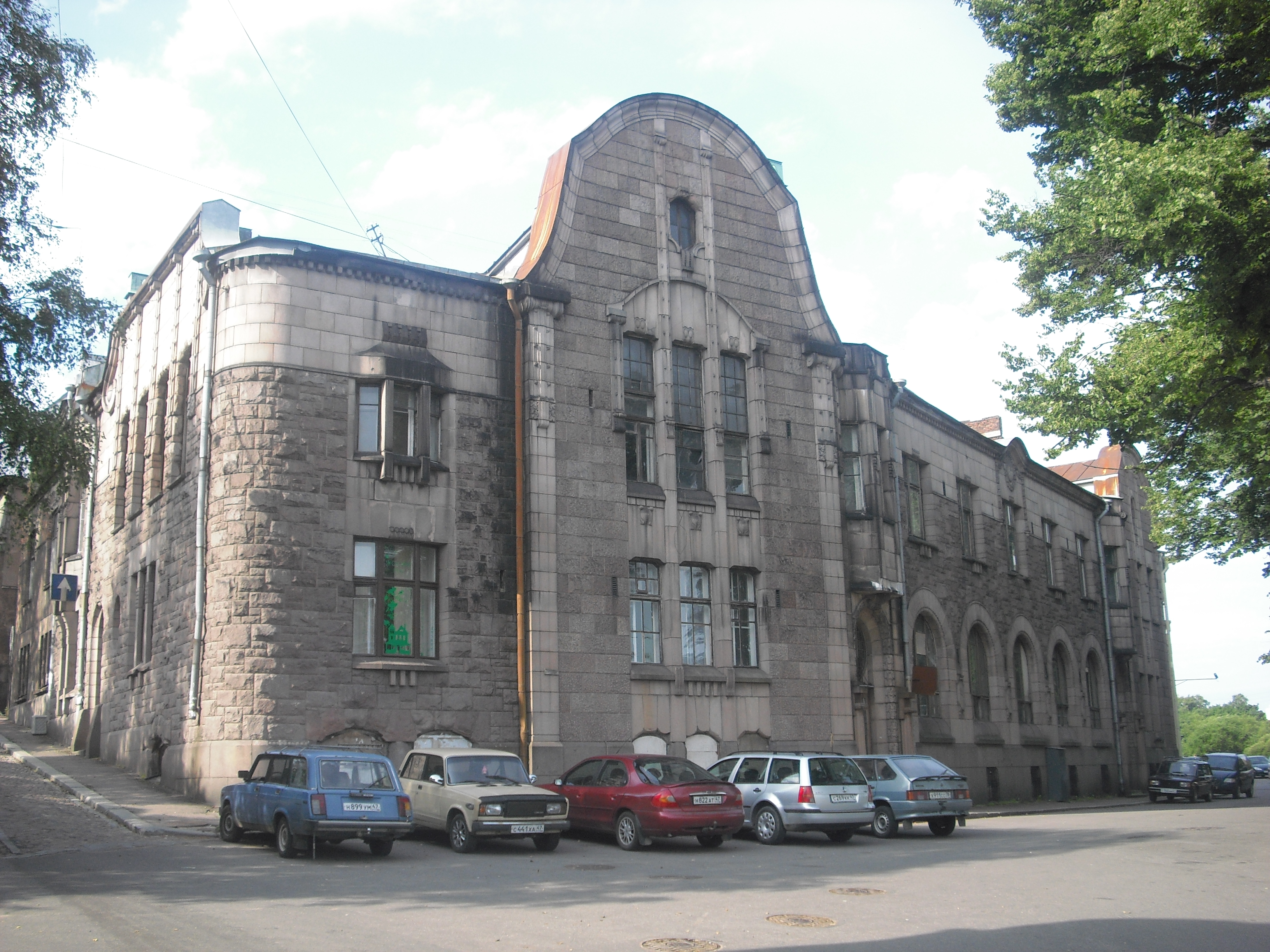 Hackman ja kumpp:n liiketalo Viipurissa